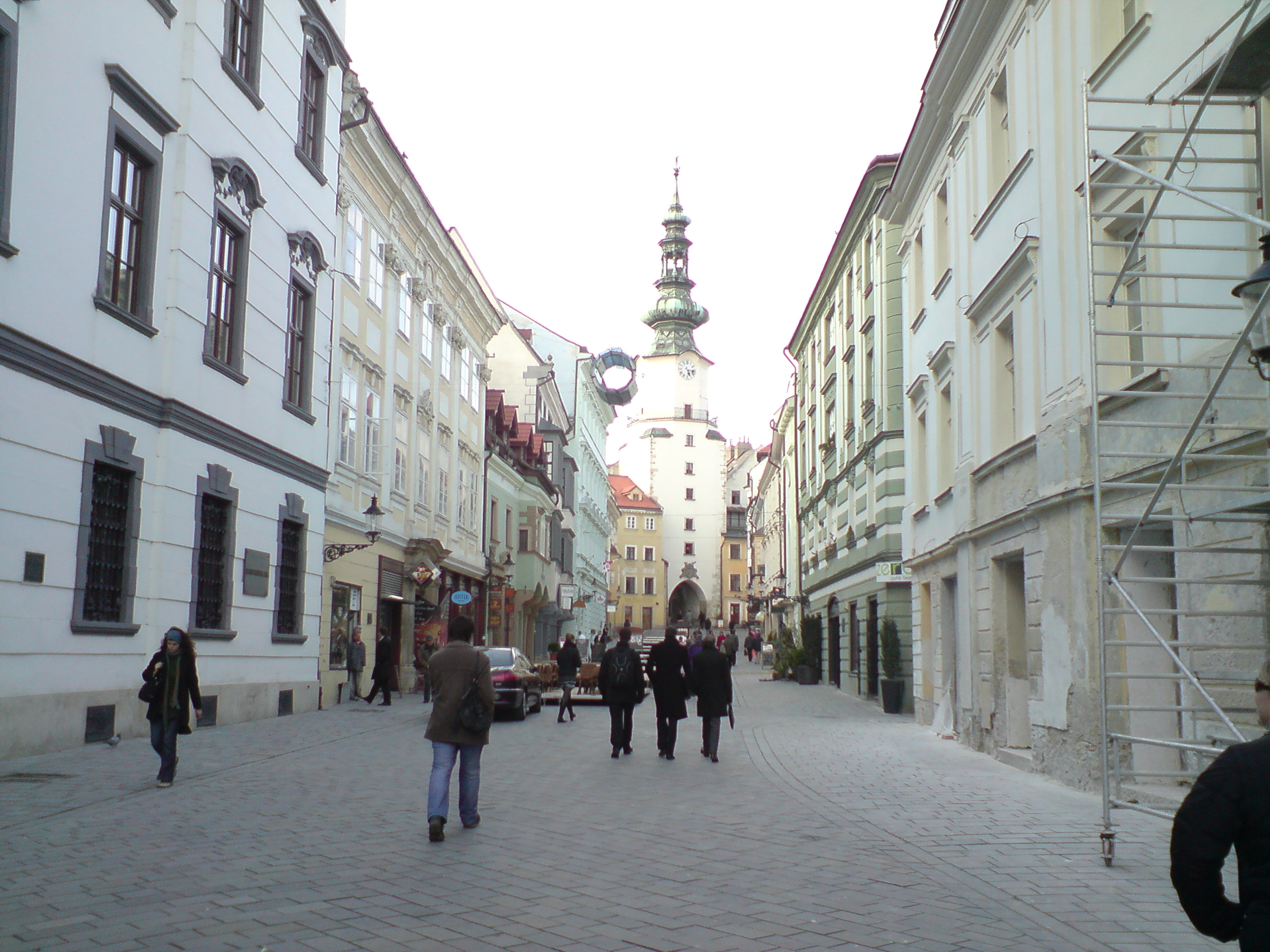 Michalská ulice v Bratislavě